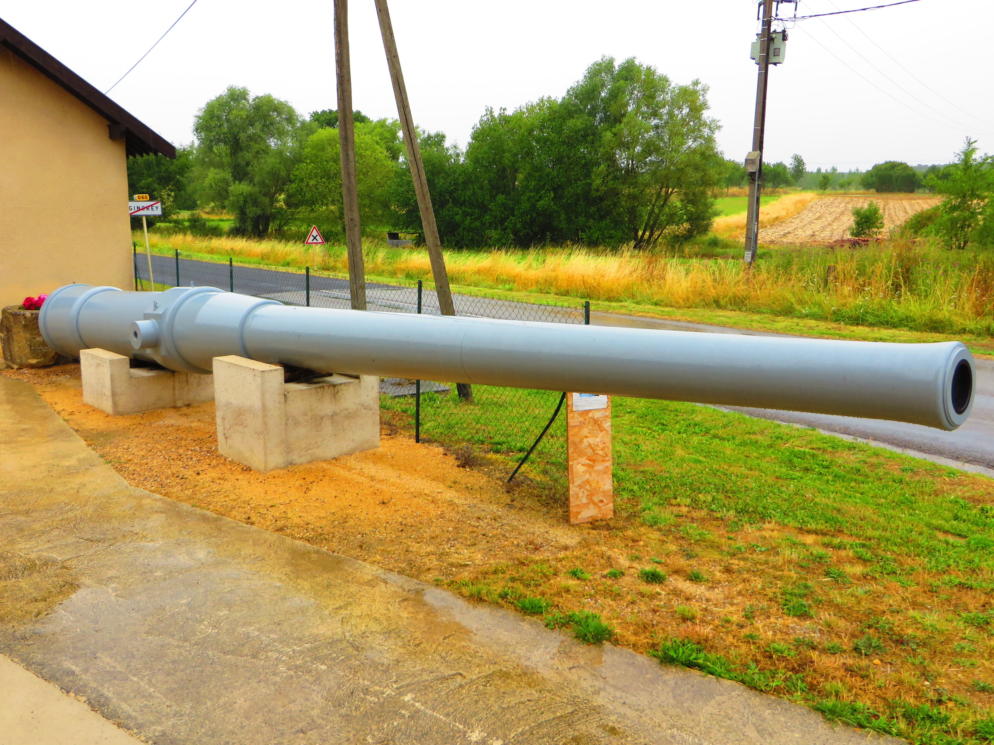 Gincrey Le canon